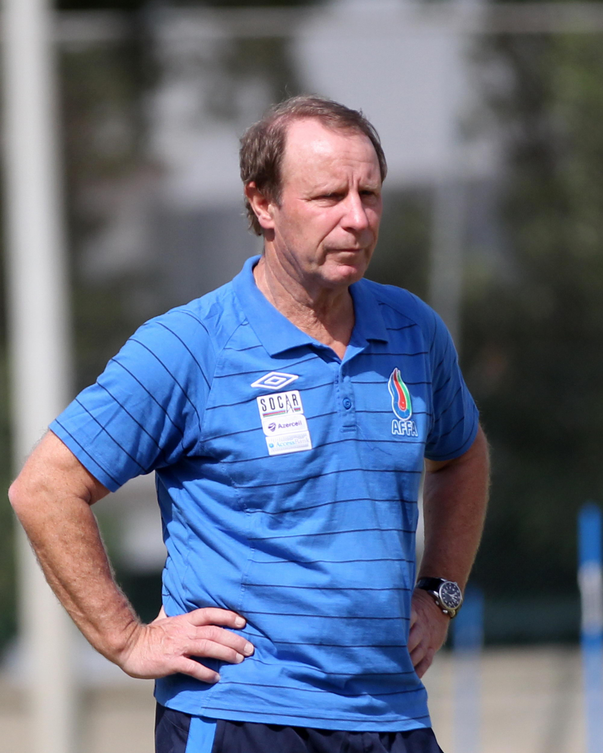 Berti Foqts